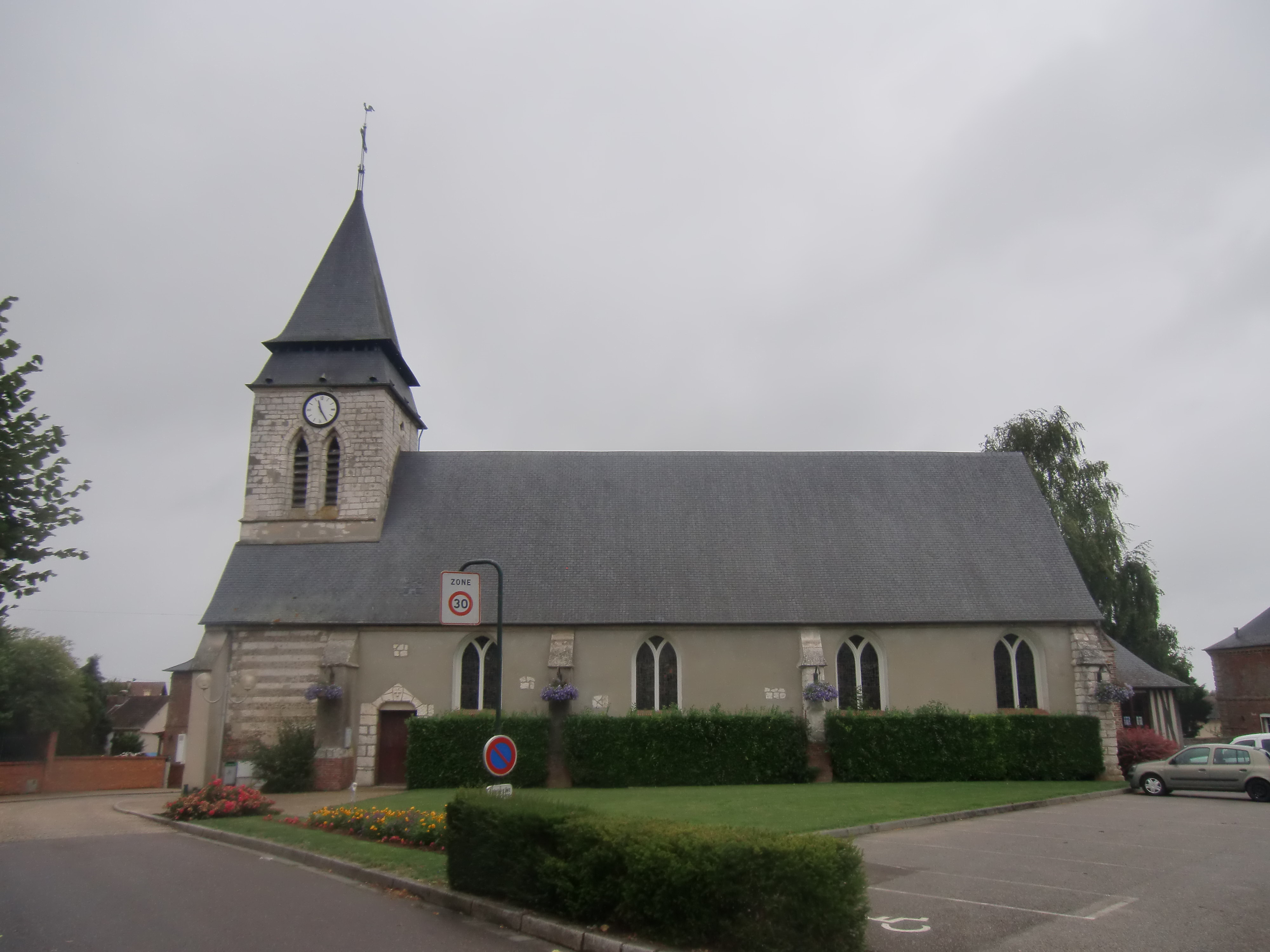 Eglise paroissiale Saint-Pierre du Bosc-Roger-en-Roumois (Eure, Normandie, France)